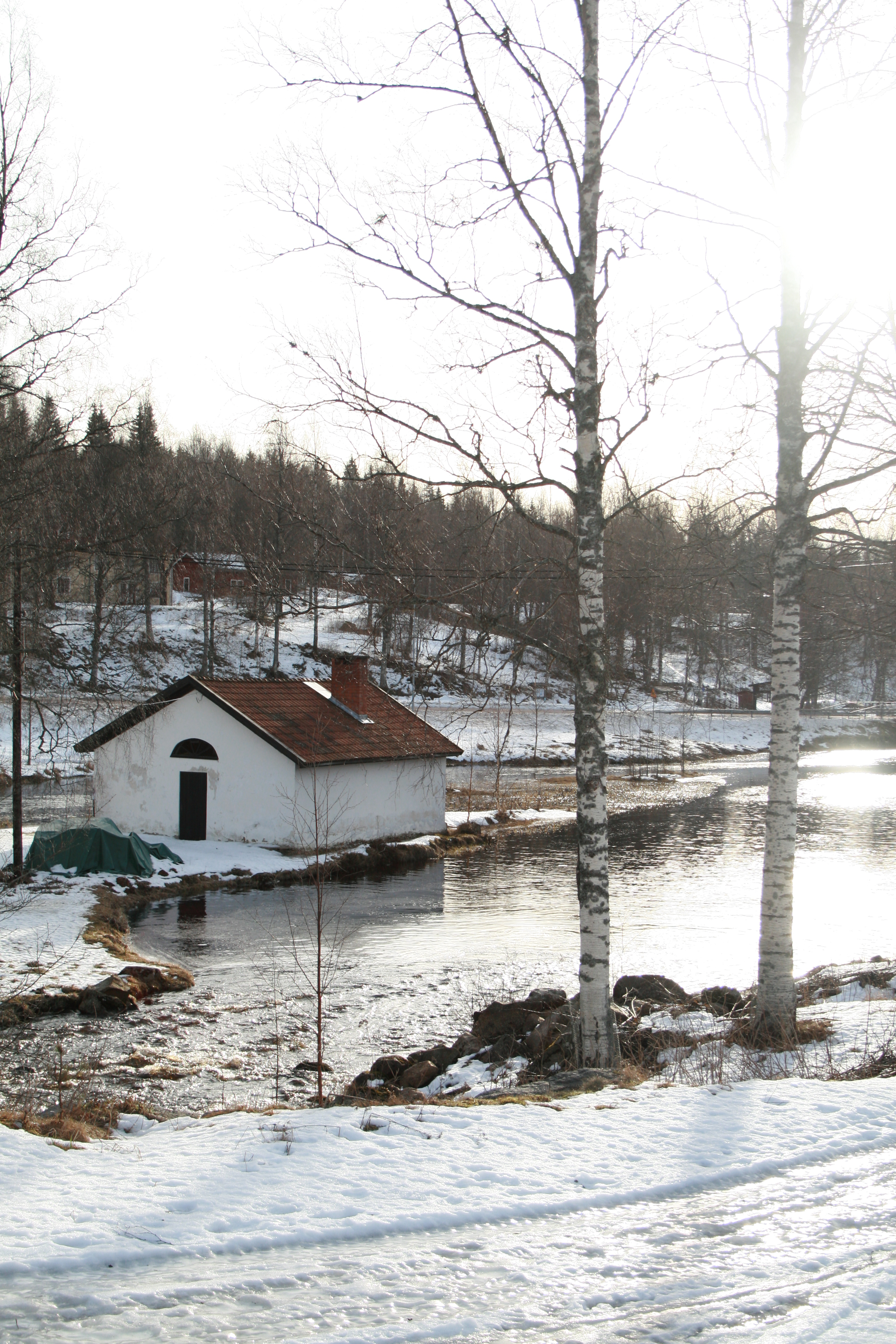 Smedja i de östra stadsdelarna i Fredriksberg, invid forsen vid Säfsjöns södra ände, där Fredriksbbergs järnbruk uppfördes på 1700-talet.